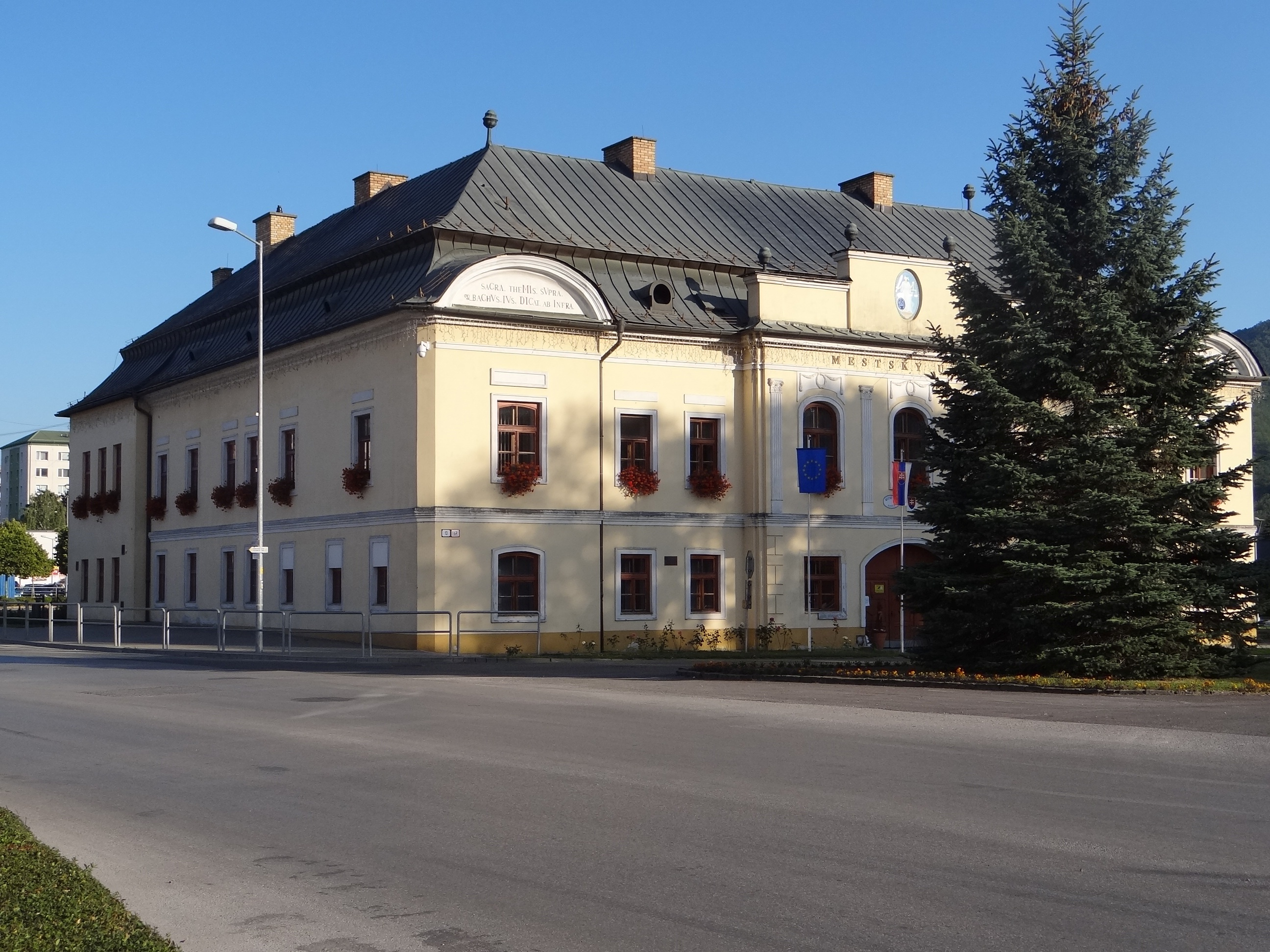 Revúca